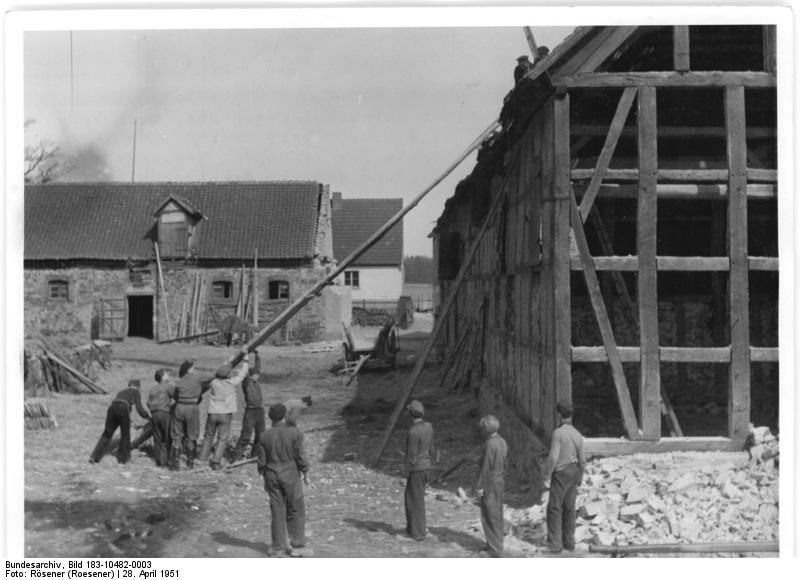 Hilgesdorf, Abbruch eines Fachwerkhauses Hilfsaktion für das vergessenen Dorf bei Helmstedt in vollem Gange. Die abgeschiedene Lage des Ortes Hilgersdorf, Kr. Haldensleben, Sachsen-Anhalt, hatte seine schlechte verkehrsmässige und technische Entwicklung bedingt. Schwer passierbare Zufahrtsstrassen und fehlender elektrischer Strom erschwerten das Leben der Bewohner. Ausserdem herrschte Mangel an Neubauernhäusern, und viele alte Häuser waren baufällig. Um den Bewohnern von Hilgersdorf zu helfen, begannen die Bau- und Holzarbeiter der volkseigenen Betriebe Magdeburgs am 1.4.1951 mit einm freiwilligen Einsatz. Die benachbarte MAS Flechtigen stellt trotz starker Beanspruchung durch die Frühjahrsbestellung Zugmaschinen und Anhänger zur Verfügung. Weitere freiwillige Einsätze folgten. die beiteiligten Belegschaften haben Wettbewerde veranstatet, welche am schnellsten in Hilgesdorf ein Neubauernhaus erstellt. Am 1. Mai soll Richtfest für den ersten Bau sein. UBz: Die baufälligen Häuser werden abgebrochen, was aber an Matieral noch gebraucht werden kann, wird aussortiert und wieder verwendet.